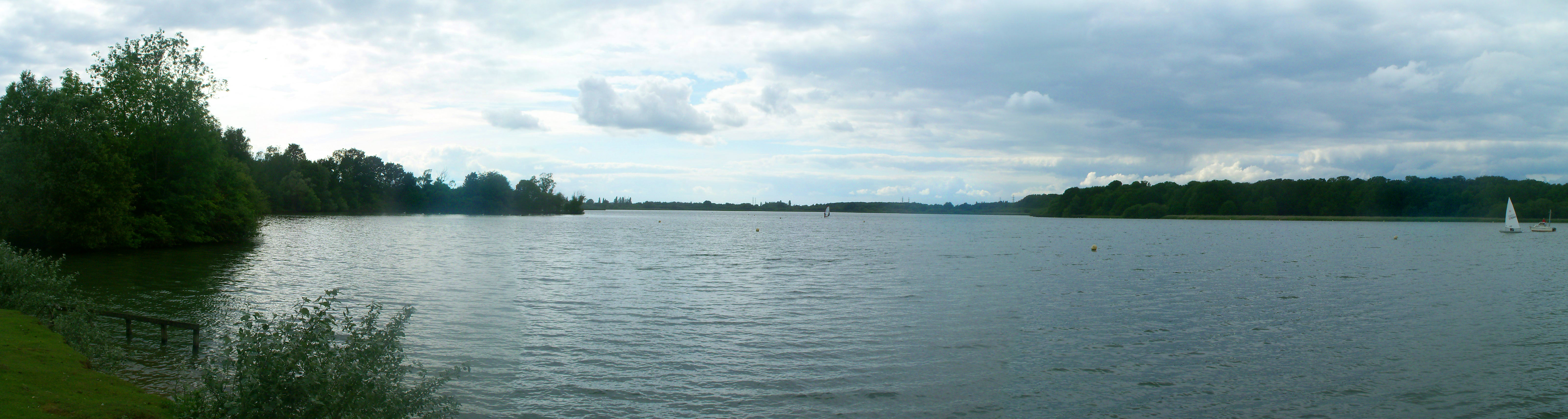 Vue de l'Etang de St Quentin, en direction du Nord.